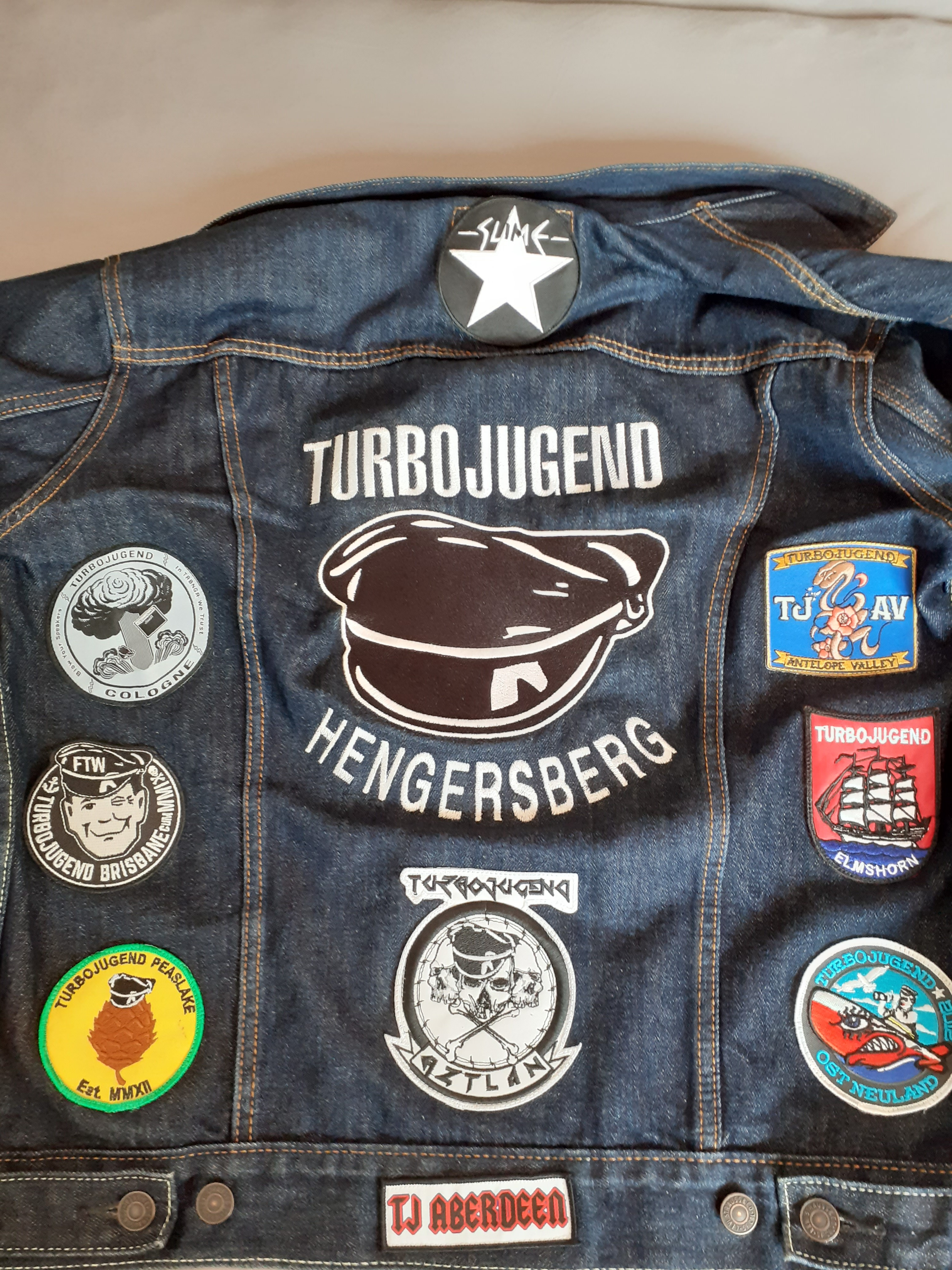 Kutte der Turbojugend Hengersberg. Dazu Patches anderer Turbojugendchapter.